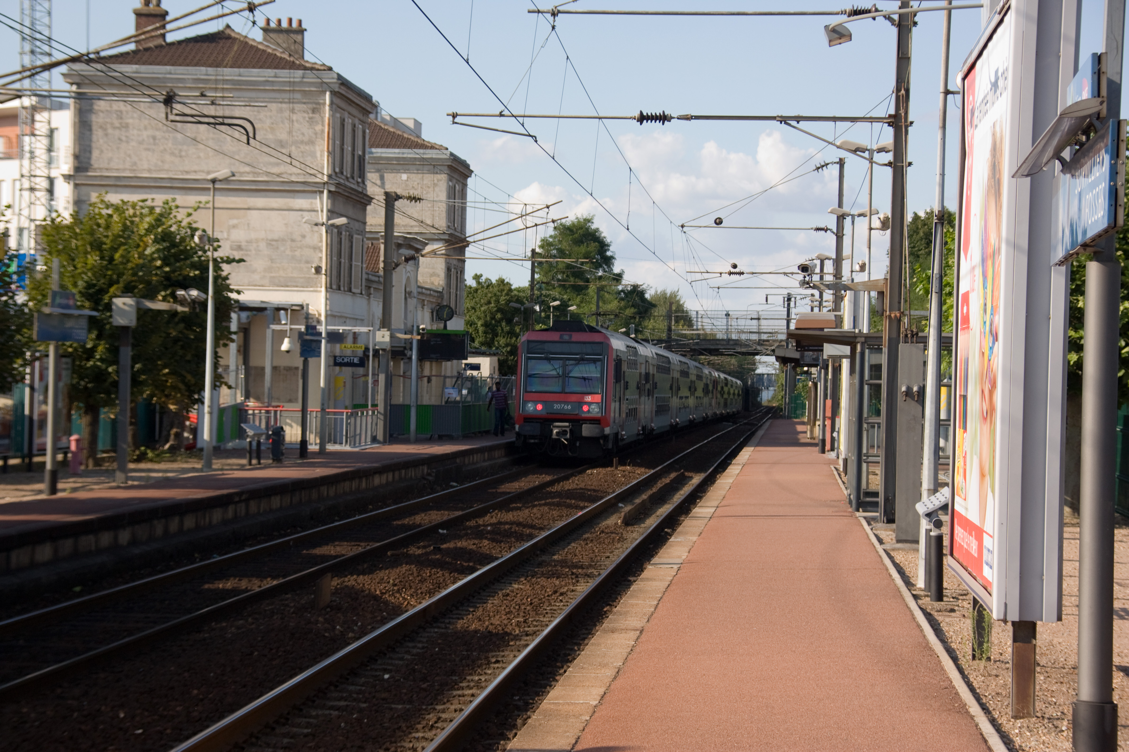 Gare de Survilliers - Fosses, département du Val-d'Oise, France